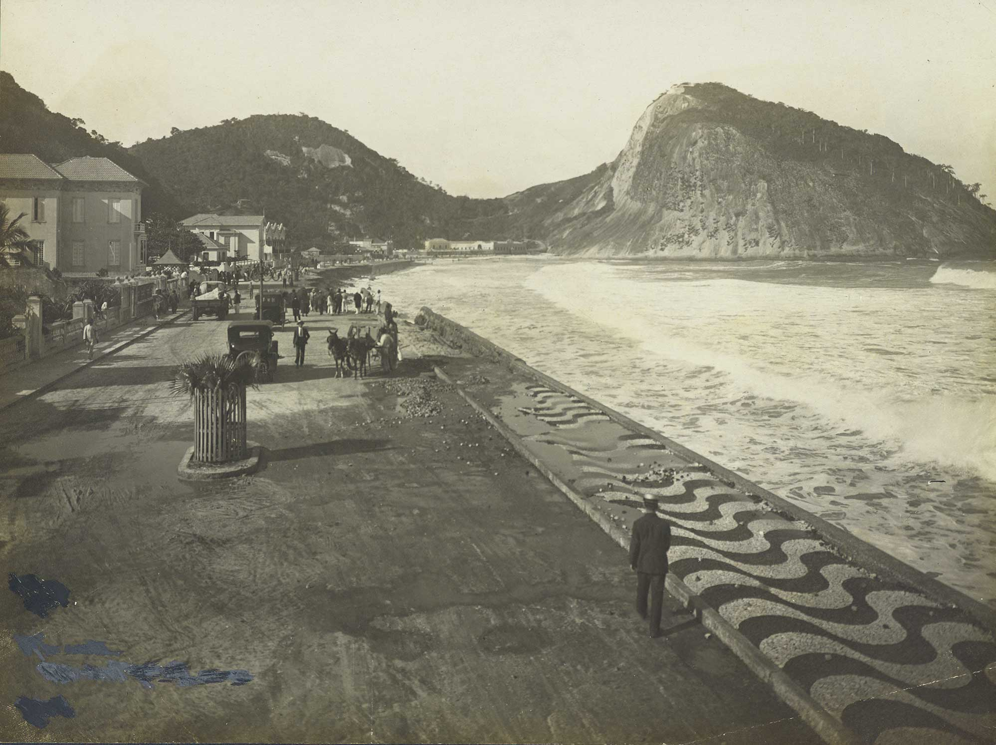 Título [Avenida Atlântica, parte do Leme] [Iconográfico] Imprenta Rio de Janeiro, RJ : [s.n.], [1921]. Descrição original 1 foto : gelatina, prata, p&b ; 16,7 x 22,4 cm.